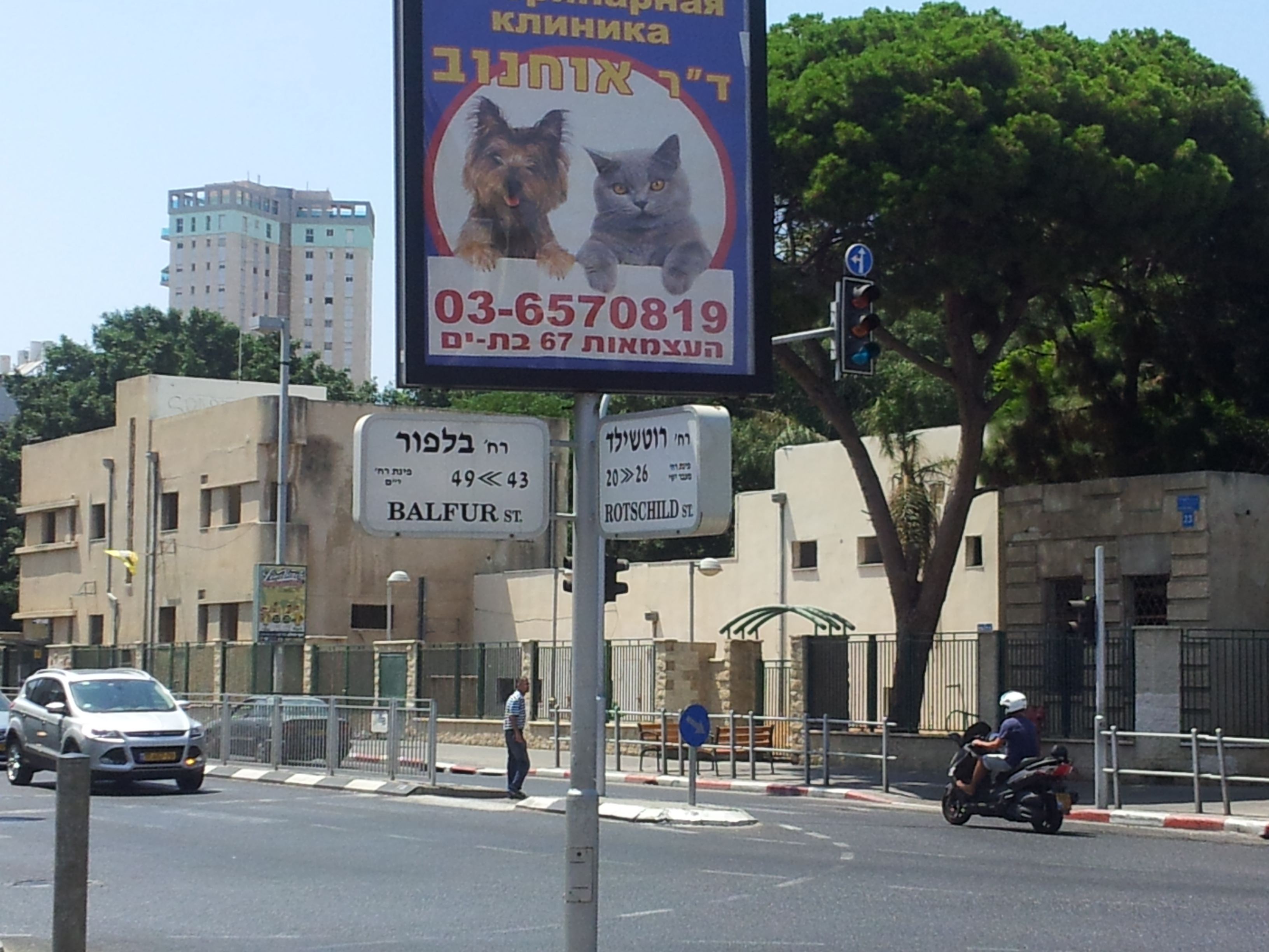 מתחם מחנה ראובן, בת ים.